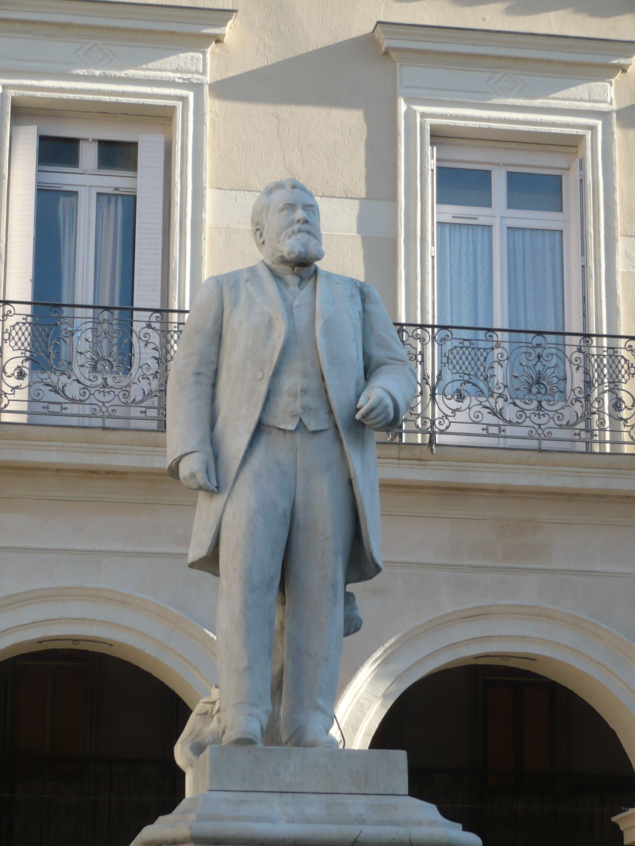 Castres